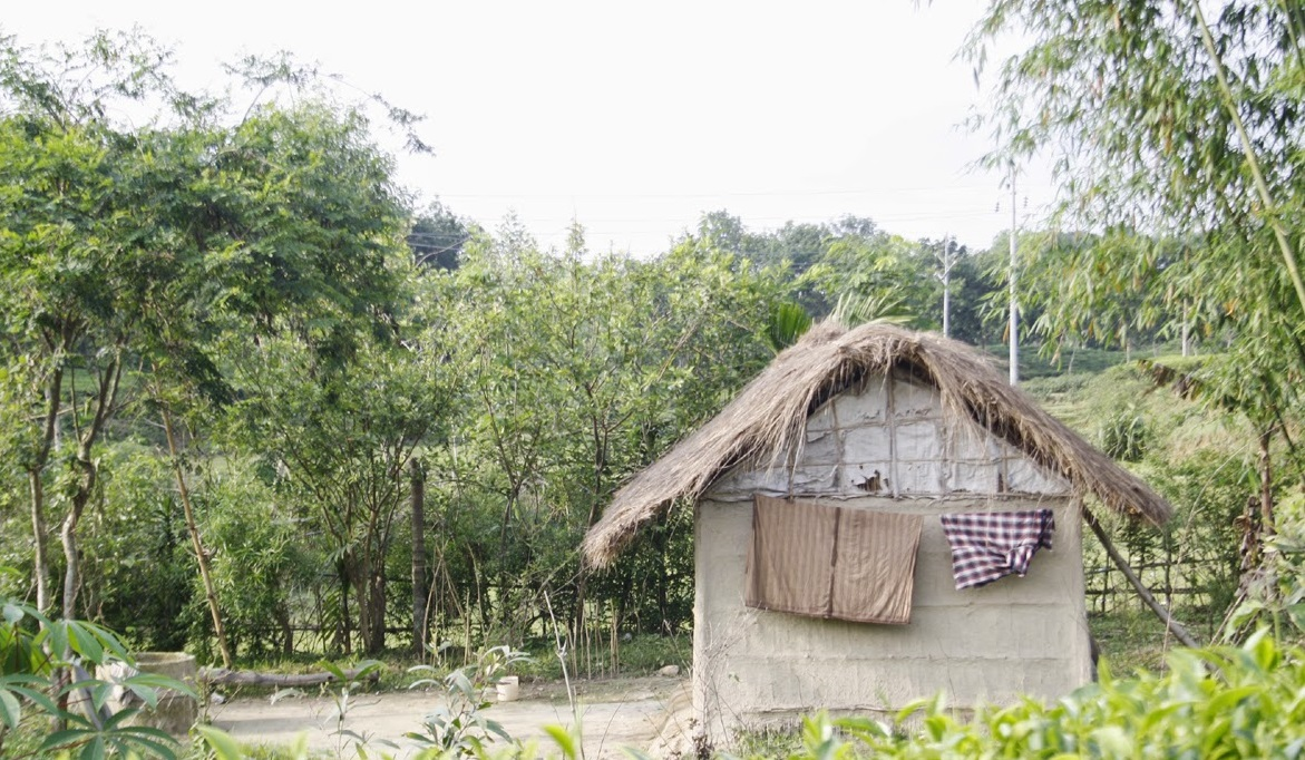 মালনি ছড়া চা বাগানের ভেতরে পাহাড়ের উপর চা শ্রমিকদের একটি থাকার ঘর।